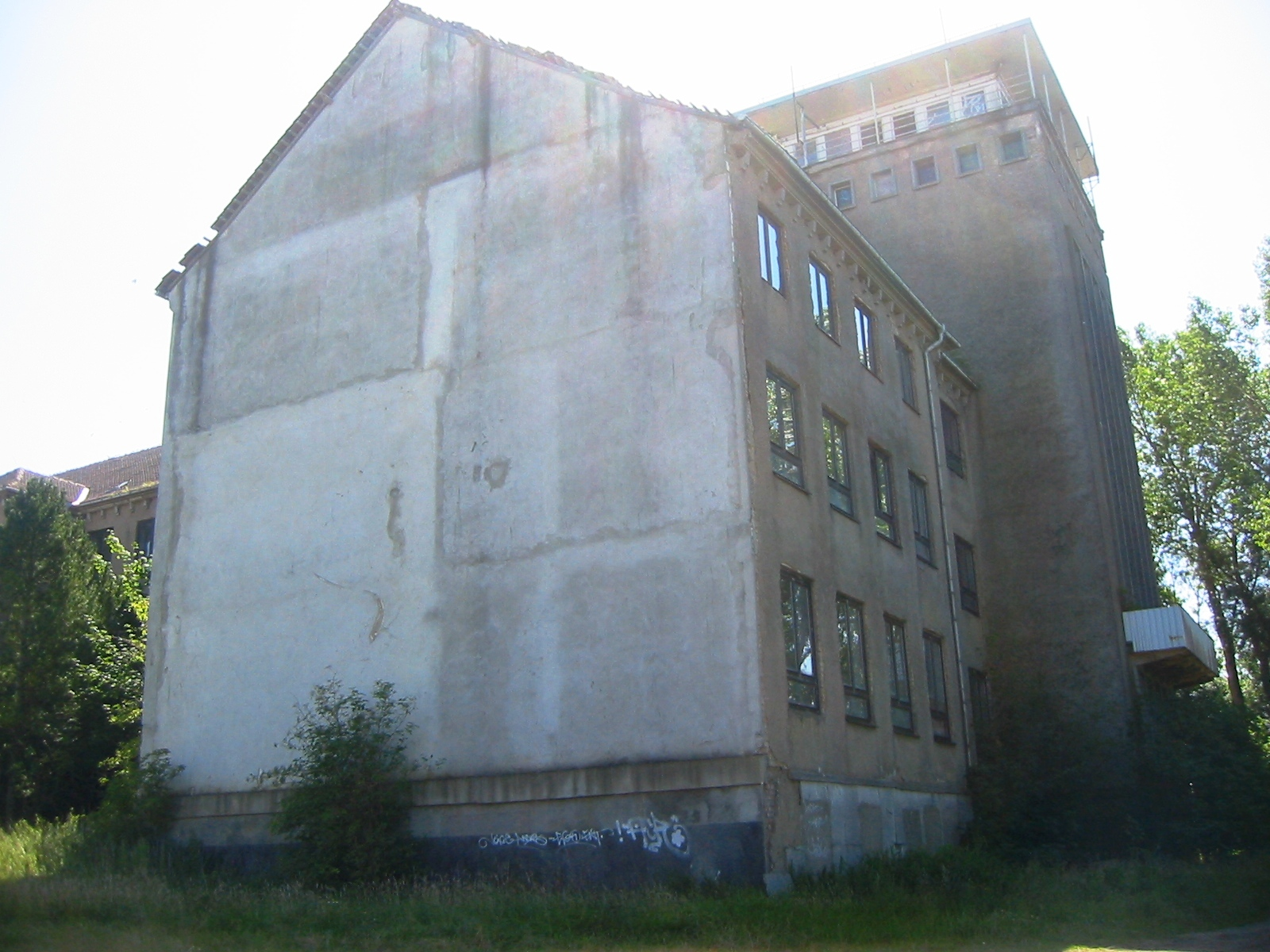 Ehemaliges Gebäude der Großherzoglichen Mecklenburgischen Navigationsschule (später Seefahrtschule Wustrow) in Wustrow (Fischland)